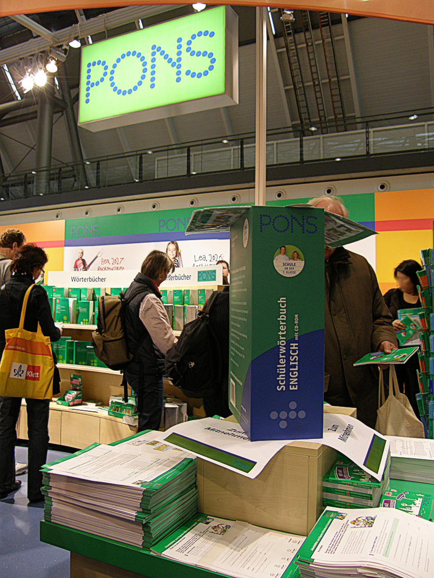 Der Messestand von Pons auf der Didacta 2008